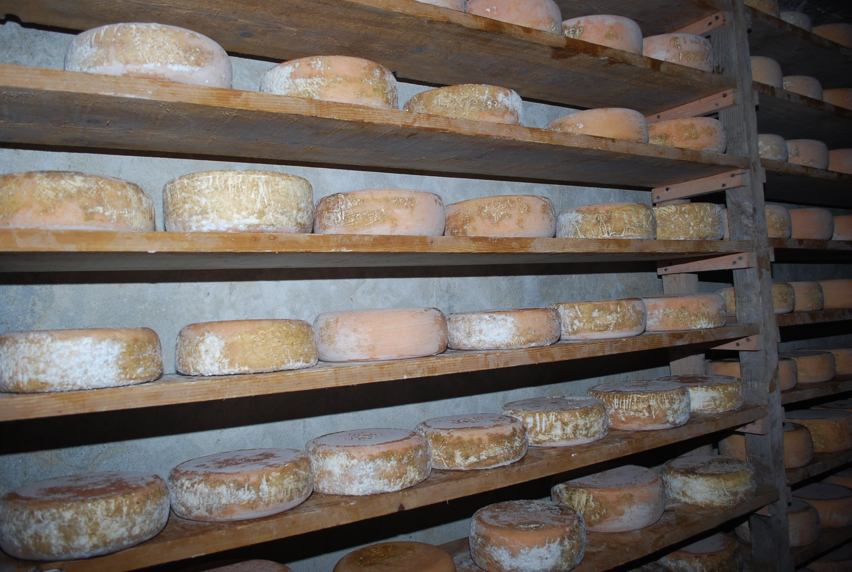 Fromages Ossau-Iraty (saloir de A&Y Perret) à Monein (Pyrénées-Atlantiques).